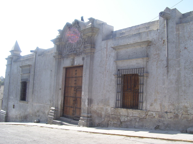 Casa de la Familia Quiroz, que fuera también casa de la moneda durante los primeros años de la república, actualmente es propiedad del grupo de hoteles peruanos Casa Andina